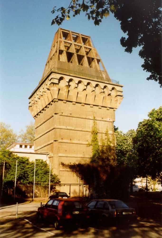 Hochbunker in der Stadt Trier am Augustinerhof